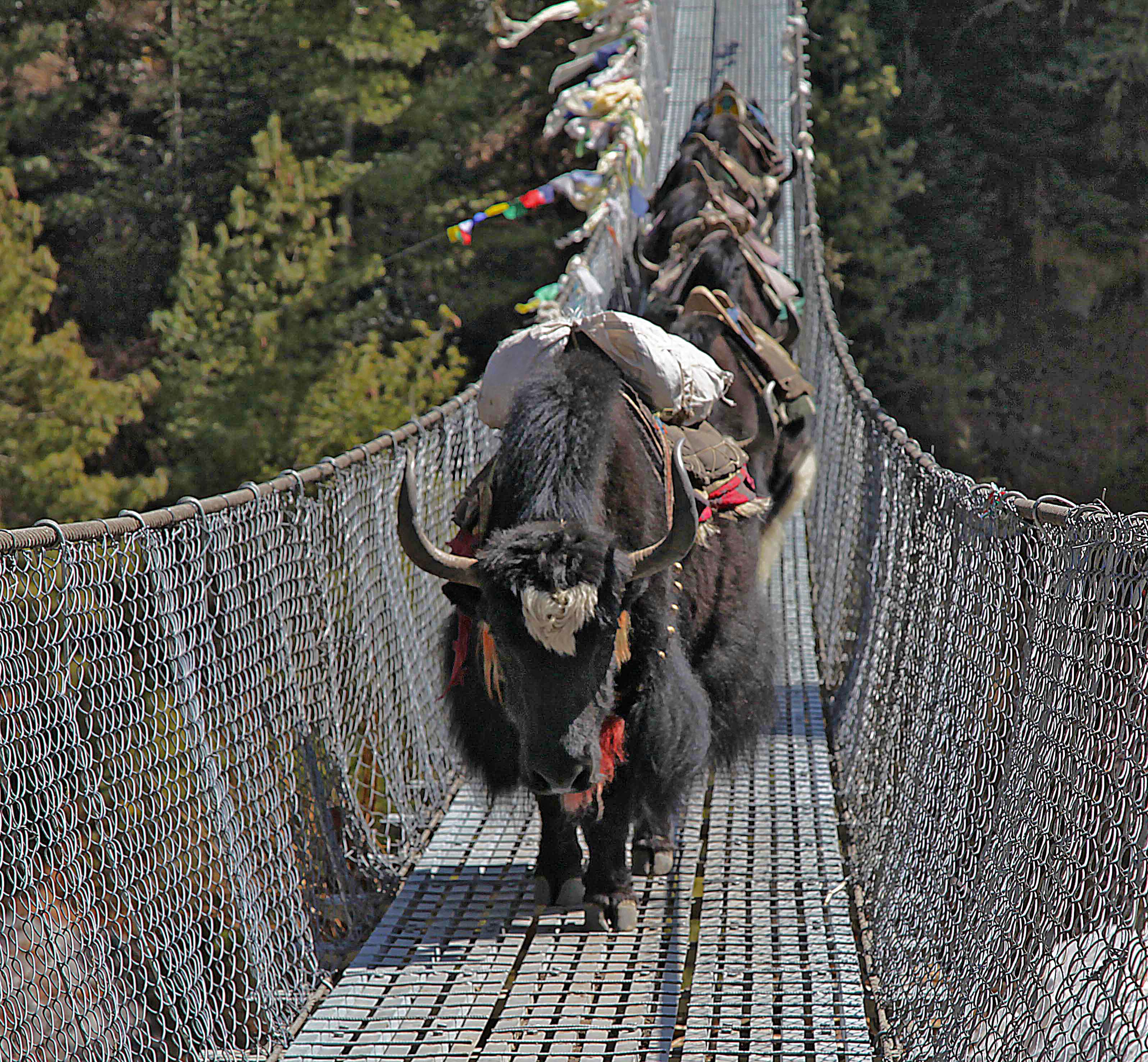 Yaks auf einer Seilbrücke in Nepal